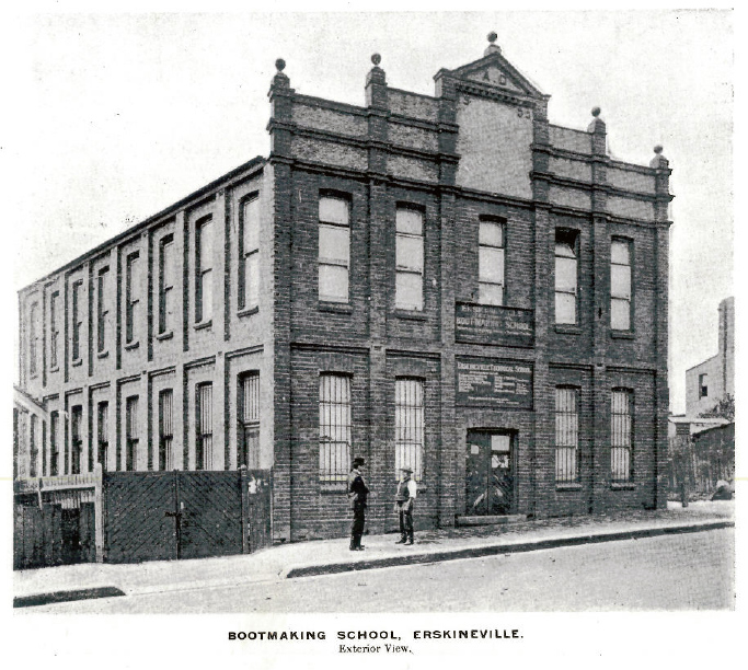 Erskineville Bootmaking School 1909